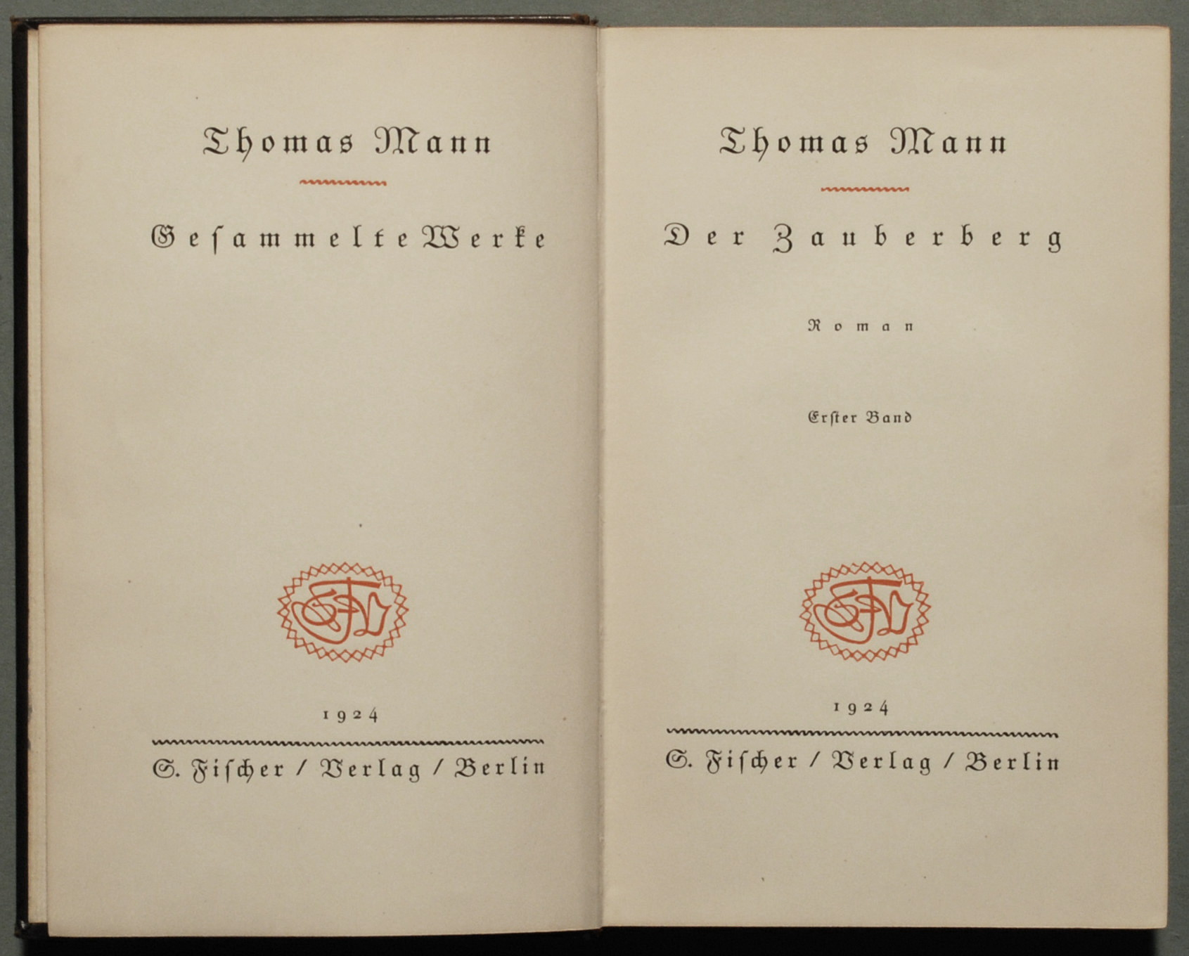 Thomas Mann: Der Zauberberg. Roman. Berlin: S. Fischer 1924, 2 Bände. Titelblatt des Erstdrucks, Exemplar Nr. 6 / 150 der Vorzugsausgabe.